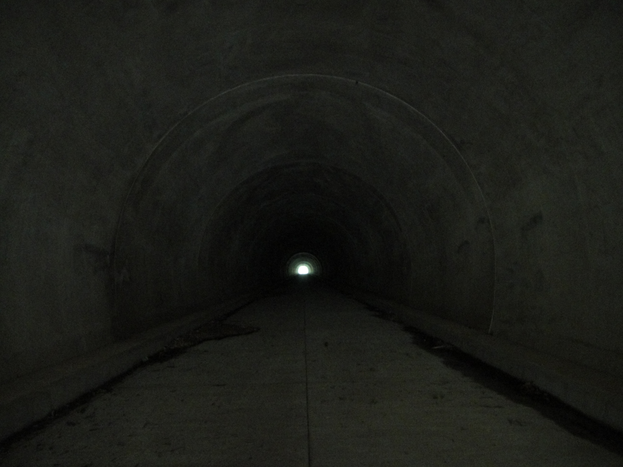 清川村道土山高畑線 清川トンネル